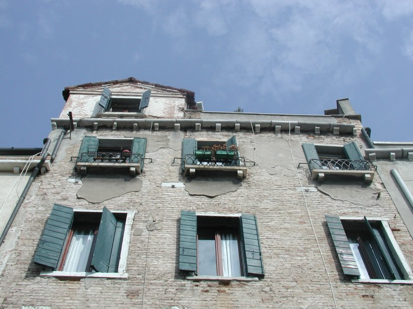 Foto scattata da me a Venezia il 19 marzo 2005. L'appartamento occupato da Casanova e dalla Buschini (di proprietà della nobile famiglia Pesaro di S.Stae NA 6673), affittato a 96 lire venete a trimestre, corrisponde alle tre finestre del terzo piano situate sotto la soffitta che si vede in alto a sinistra.